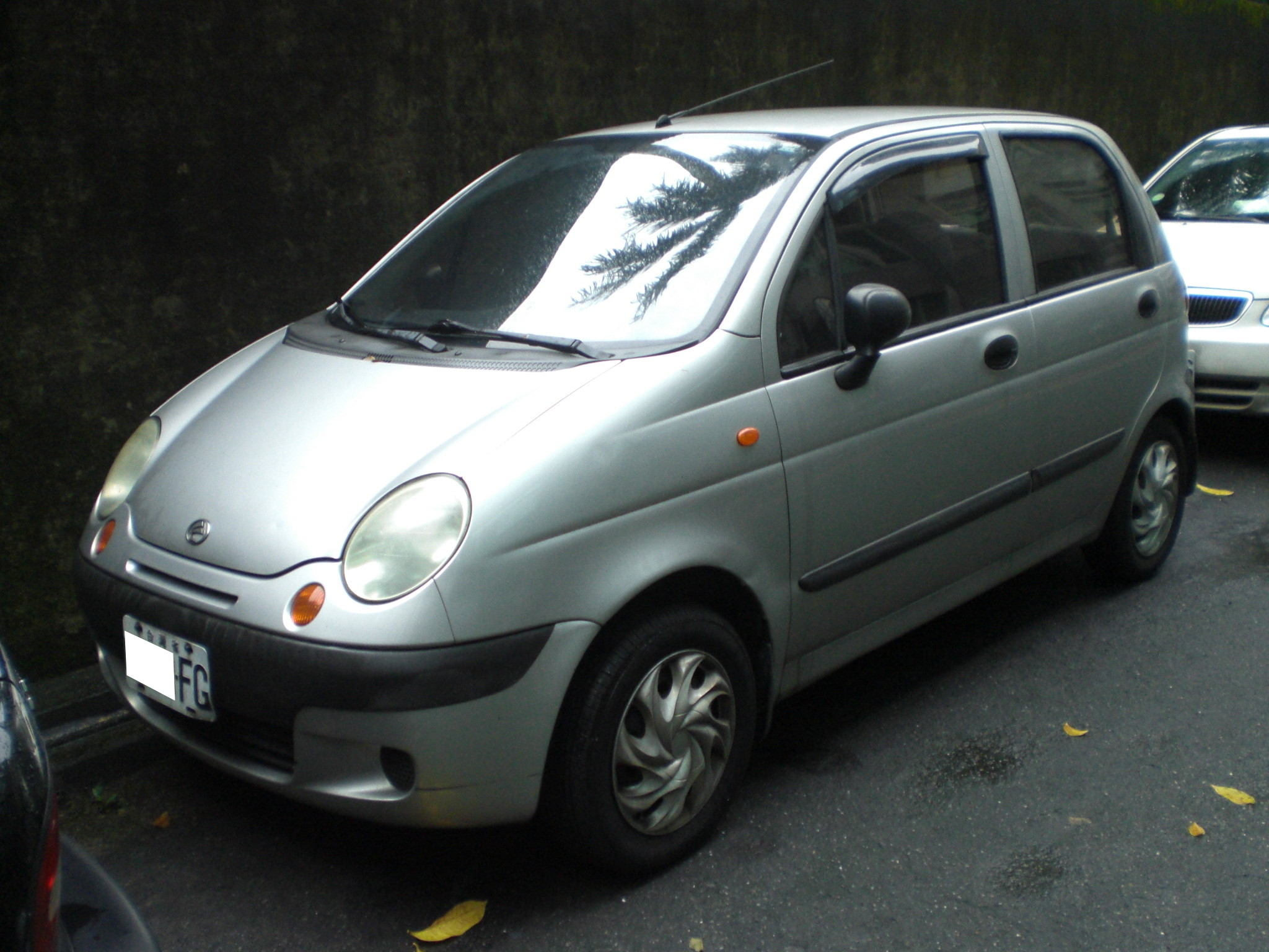 中文（台灣）: 台朔汽車Matiz（台朔二號）銀色車左前方外觀。